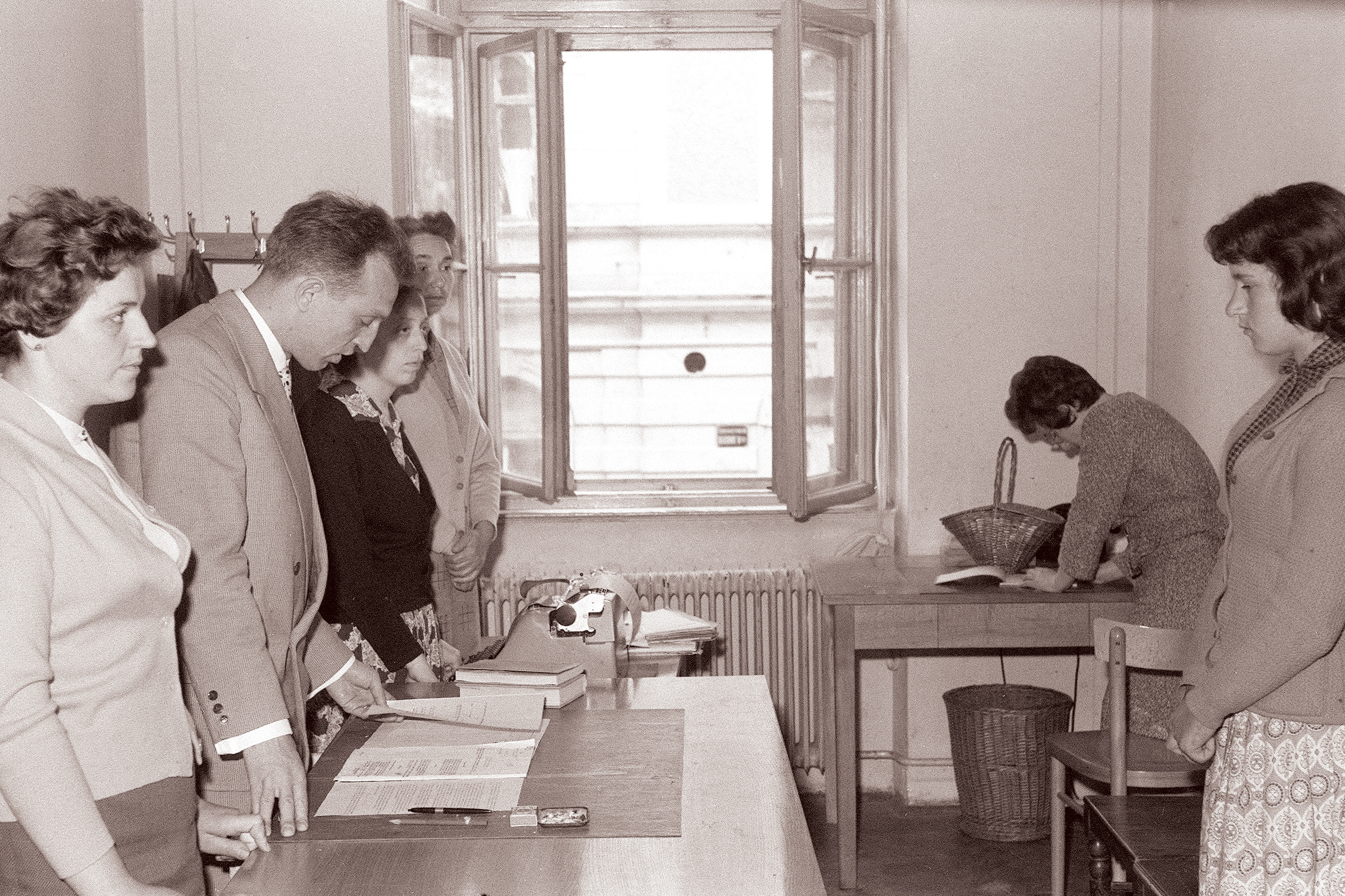 Okrajno sodišče v Mariboru je danes dopoldne obsodilo Barbaro Pšajd na dve leti zapora zaradi ugrabitve otroka